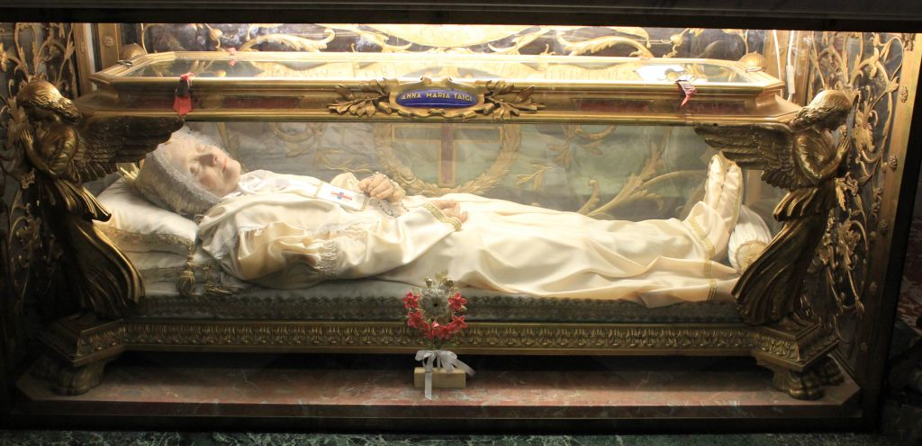 Anna Maria Gesualda Antonia Taigi at San Crisogono in Rome